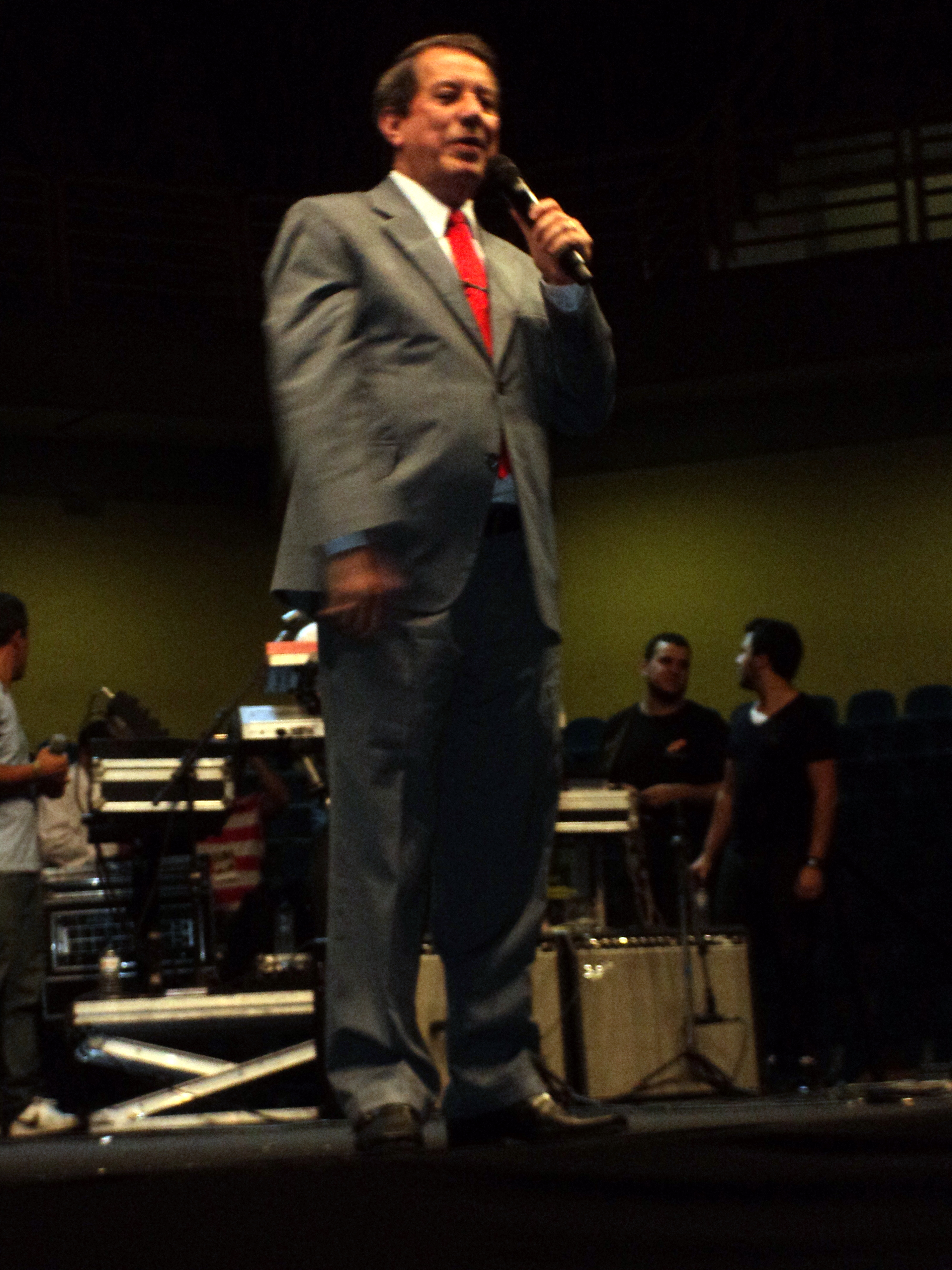 R.R. Soares durante evento em Goiânia em 2011